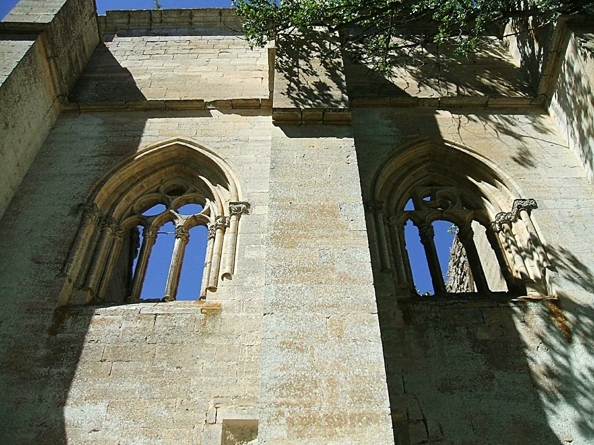 Real Monasterio de Santa María de Fresdelval (Burgos)